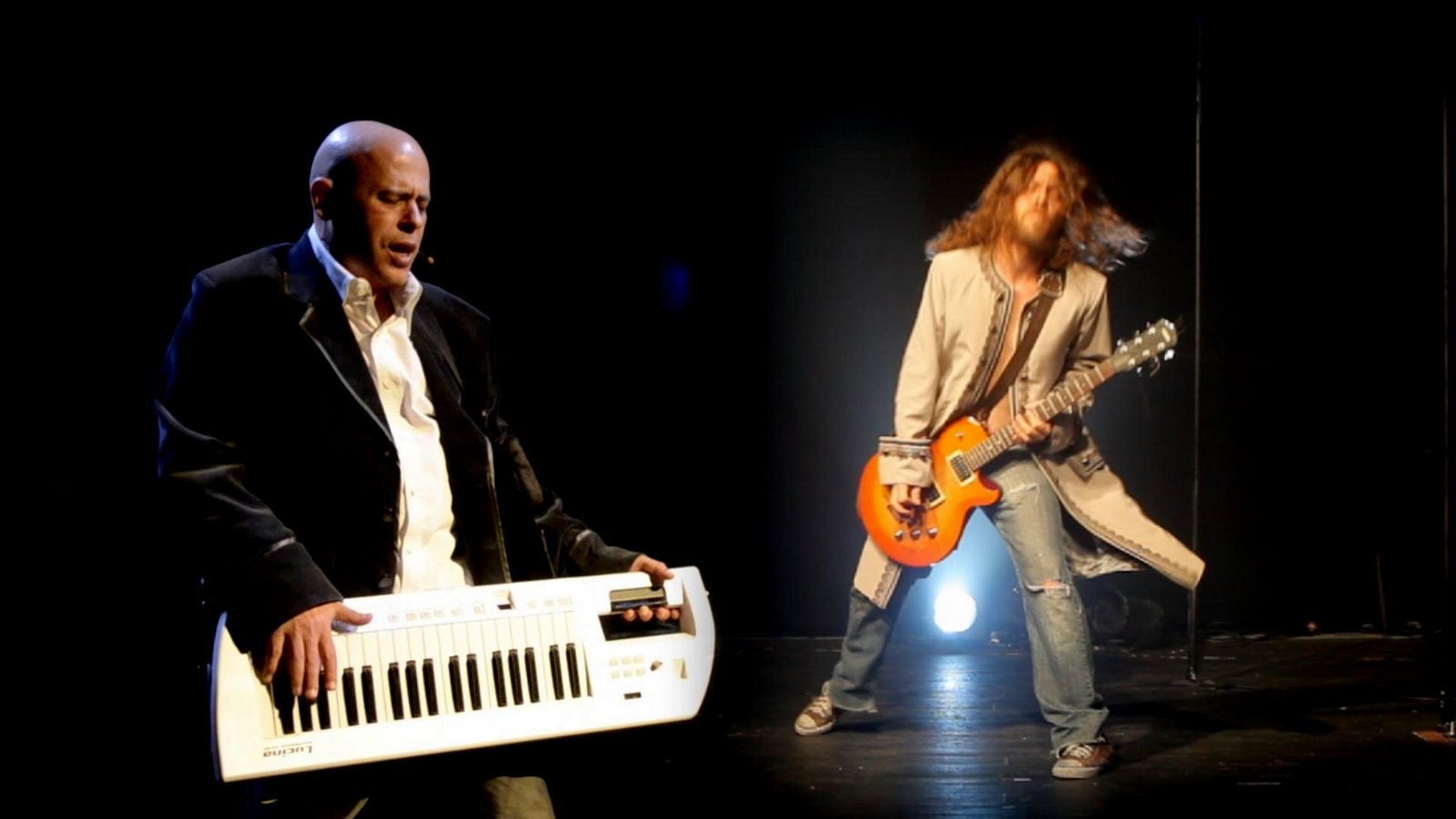 אבי בנימין ואיליה מם